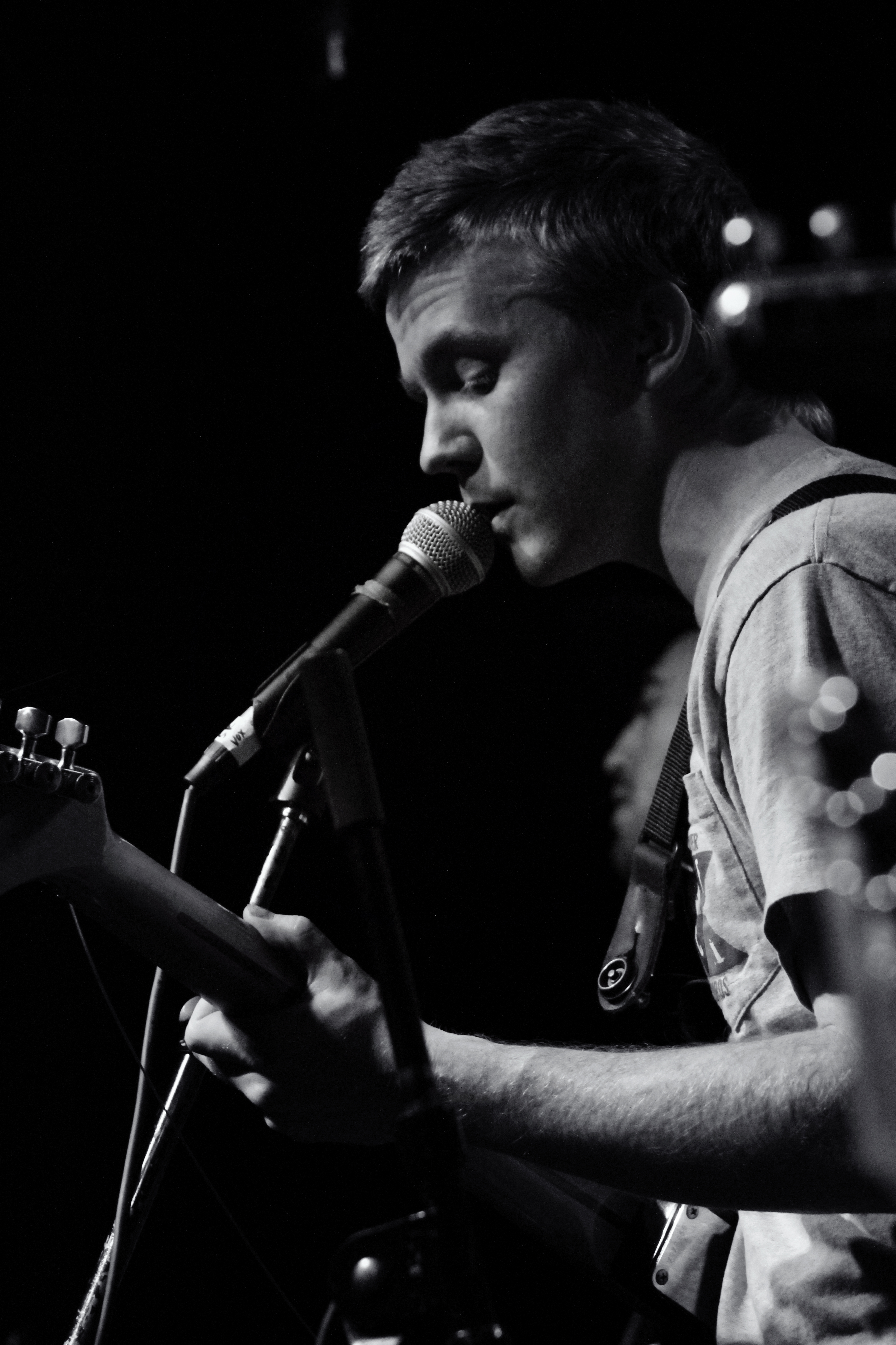 Pinegrove